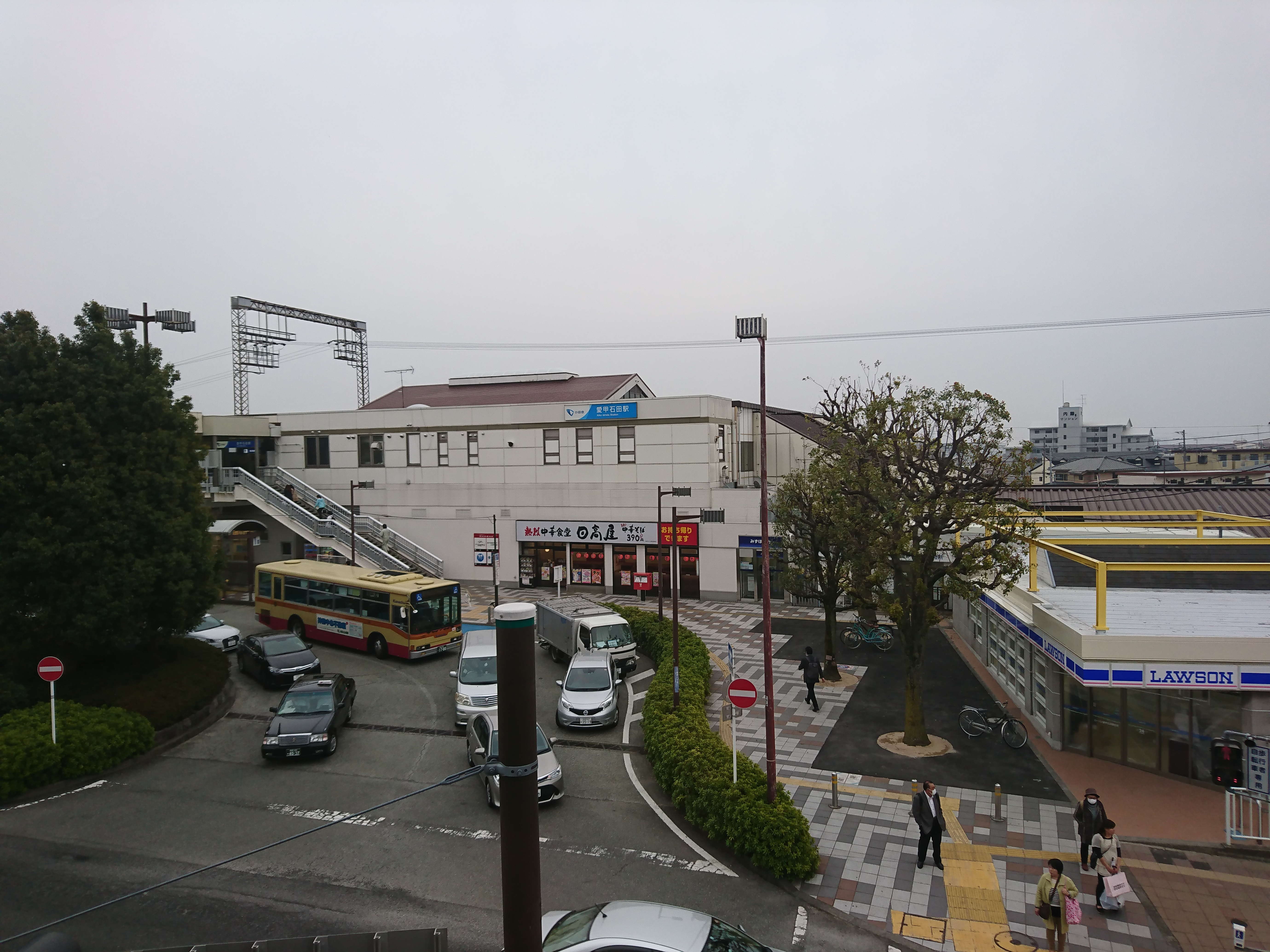 愛甲石田駅北口